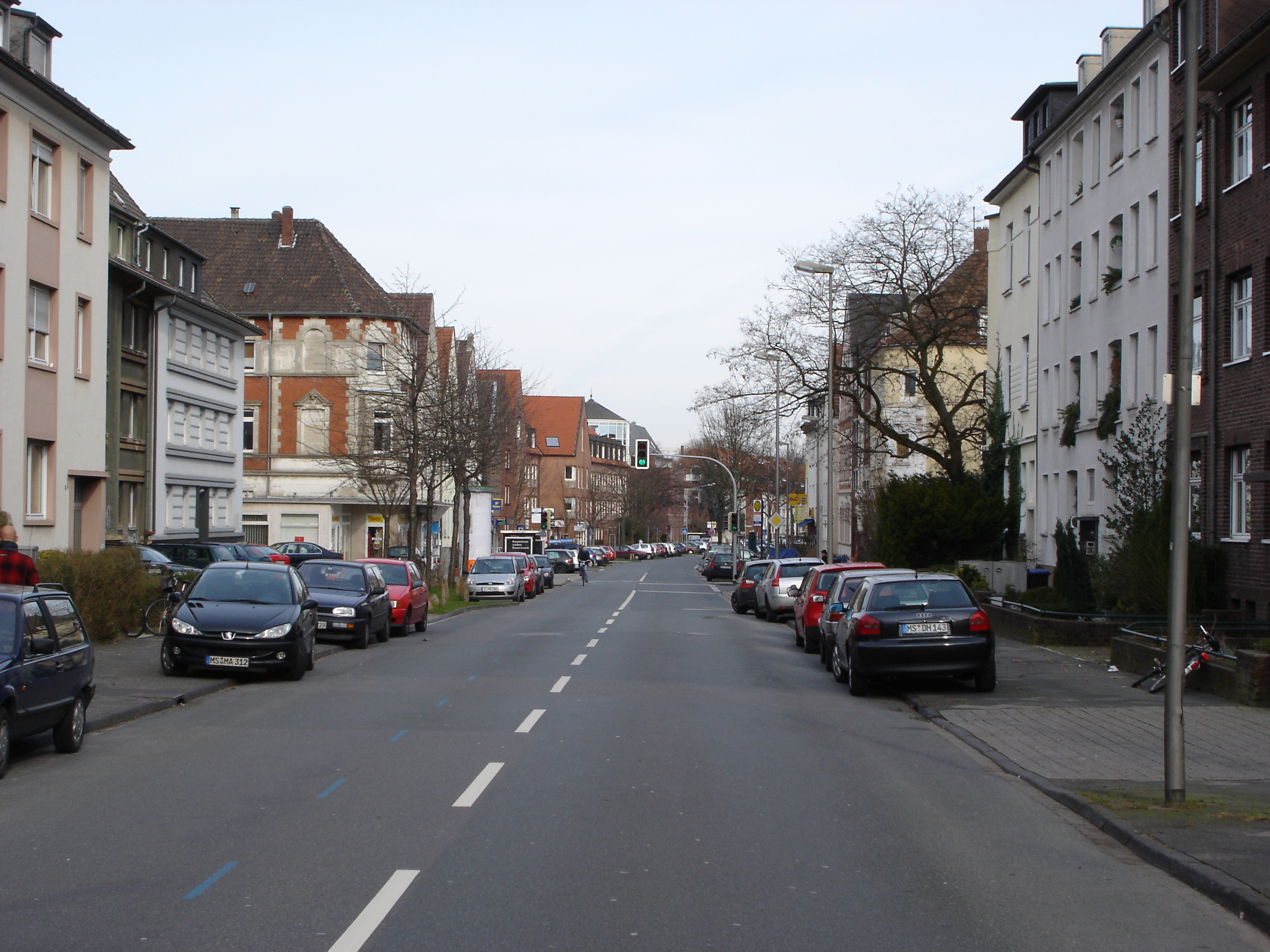 The Scharnhorststrasse in Pluggendorf, Münster, Germany